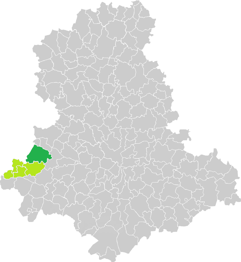 Carte de situation de la commune de Rochechouart (en vert foncé) dans le votre Canton (en vert clair) sur une carte des communes de la Haute-Vienne